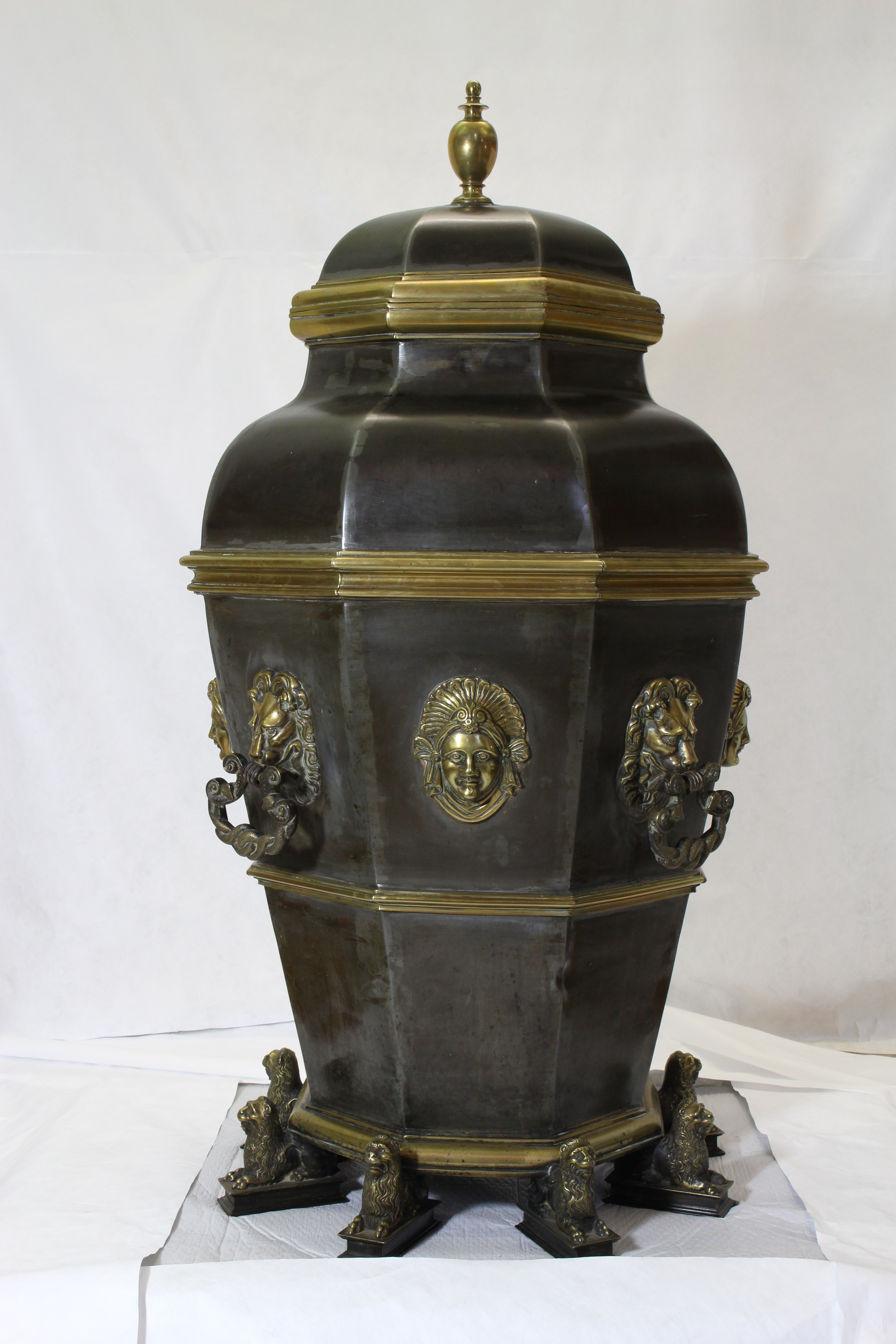 Vase à Thériaque du XVIIème siècle par J. Besson et A. Morand ; Propriété : Musée des Hospices civils de Lyon, musée de France, n° d'inventaire 2007.0.1431.M